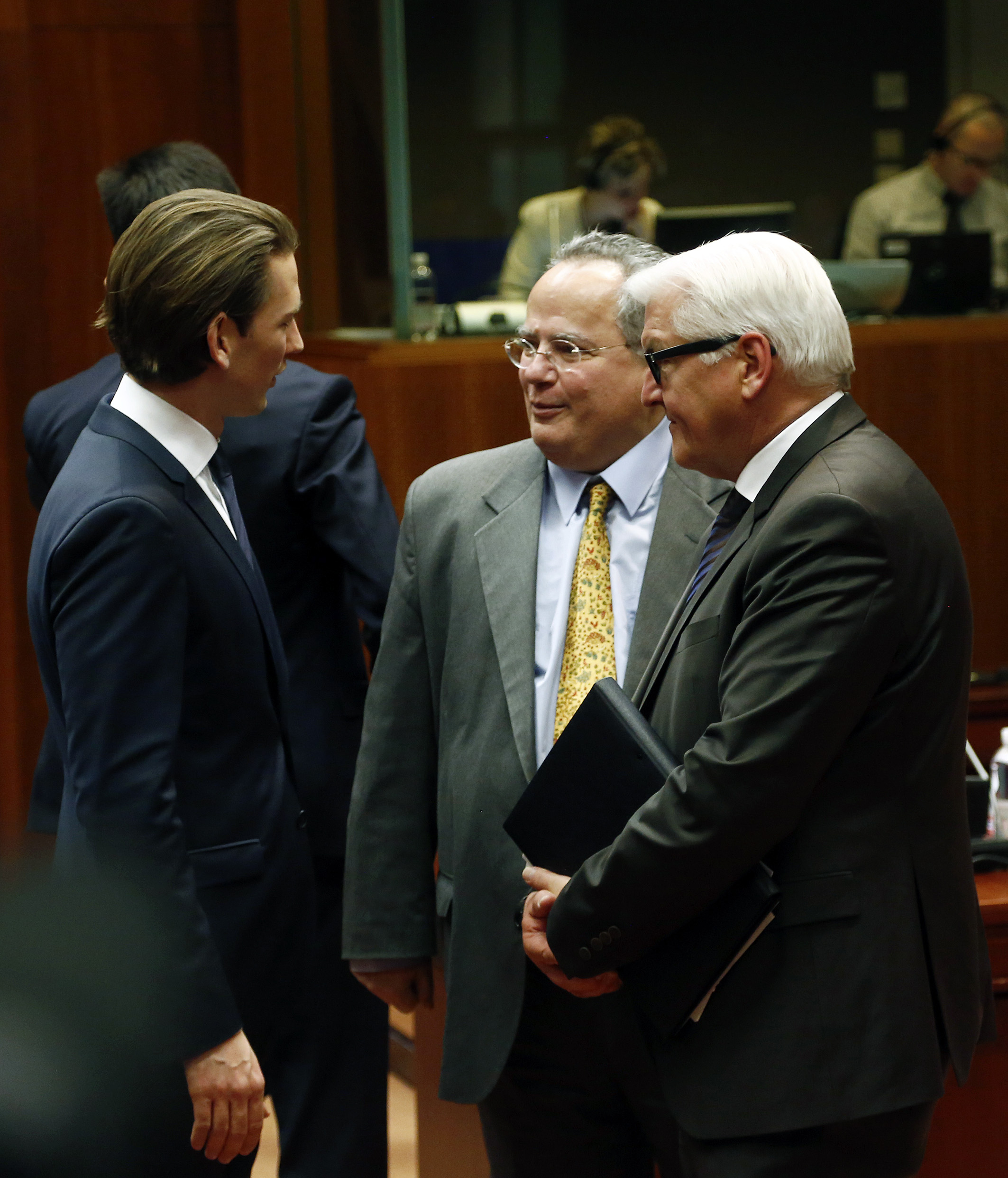 Sonderrat der Außenminister. Bundesminister Sebastian Kurz im Gespräch mit dem neuen griechischen Außenminister Nikos Kotzias und dem deutschen Minister Frank-Walter Steinmeier. Brüssel, 29.01.2015, Foto: Dragan Tatic